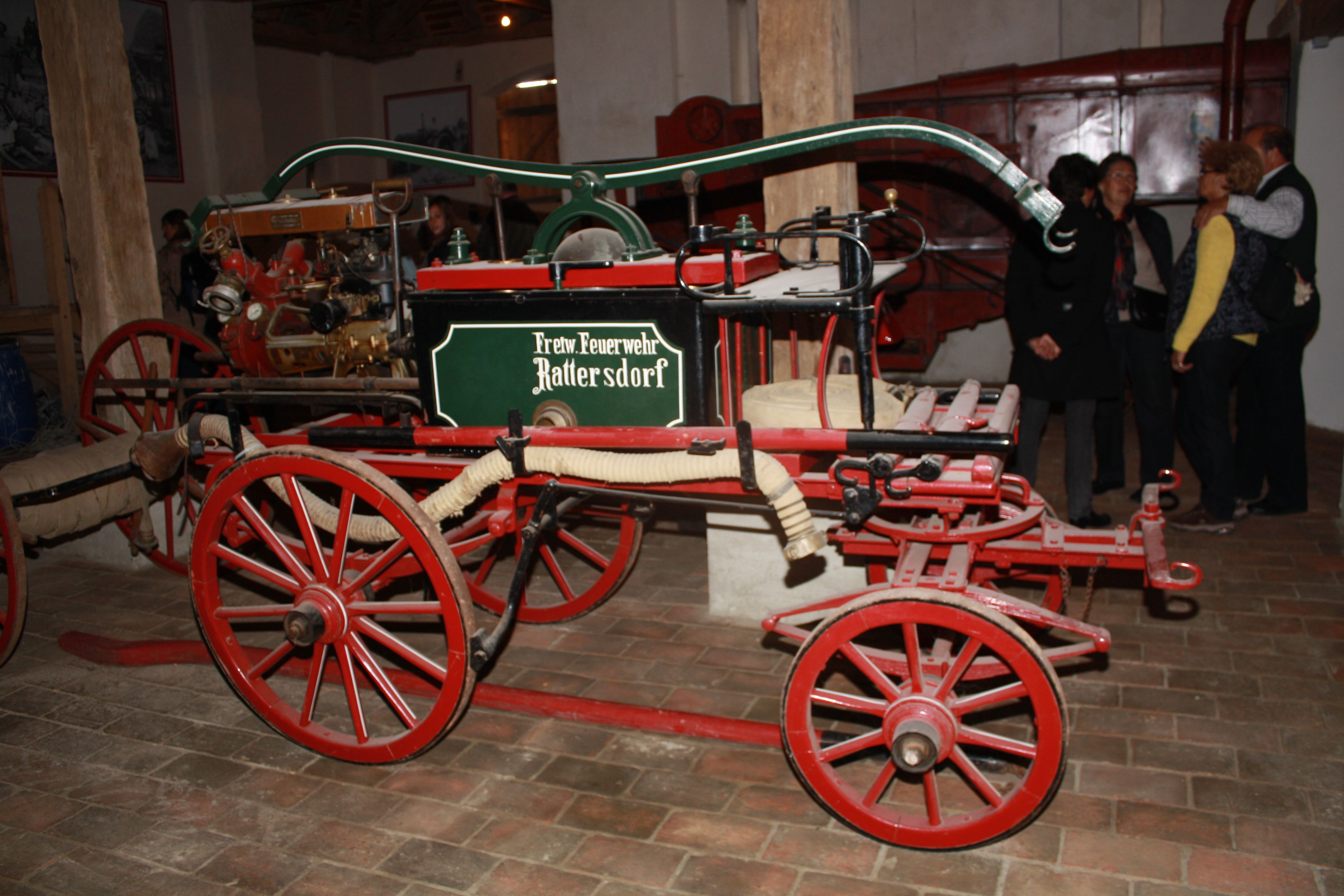 Hydrophor aus dem Jahr 1894, später ergänzt mit einer tragbaren Motorpumpe im Traktormuseum Traktorium in Drasenhofen in Niederösterreich, Leihgabe der FF Rattersdorf im Burgenland